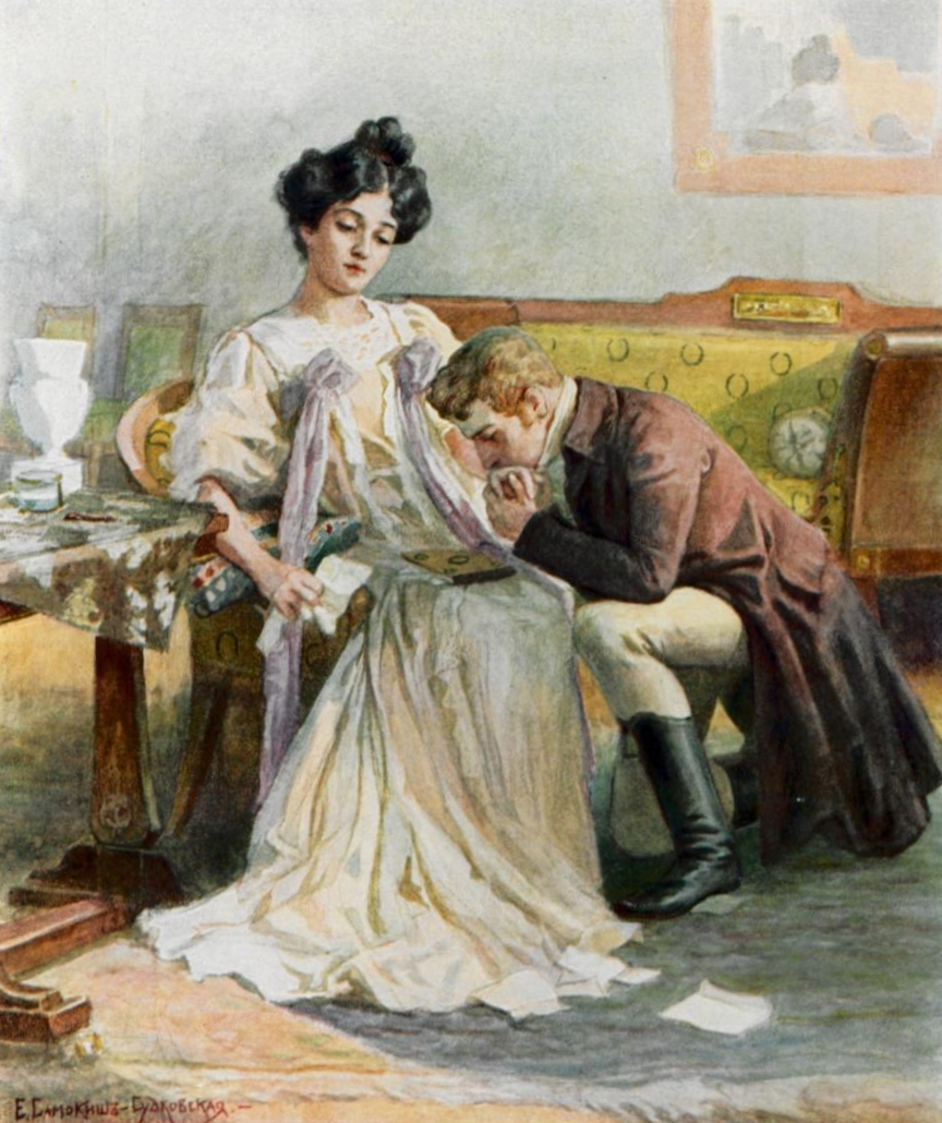 Пушкин А. Евгений Онегин. С иллюстрациями Е.Самокиш-Судковской. Издание первое. Пг., издание т-ва Р.Голике и А.Вильборг, 1908, 120 с., с илл. 26,2 x 23,2 см. Титульный лист работы А.Лео.